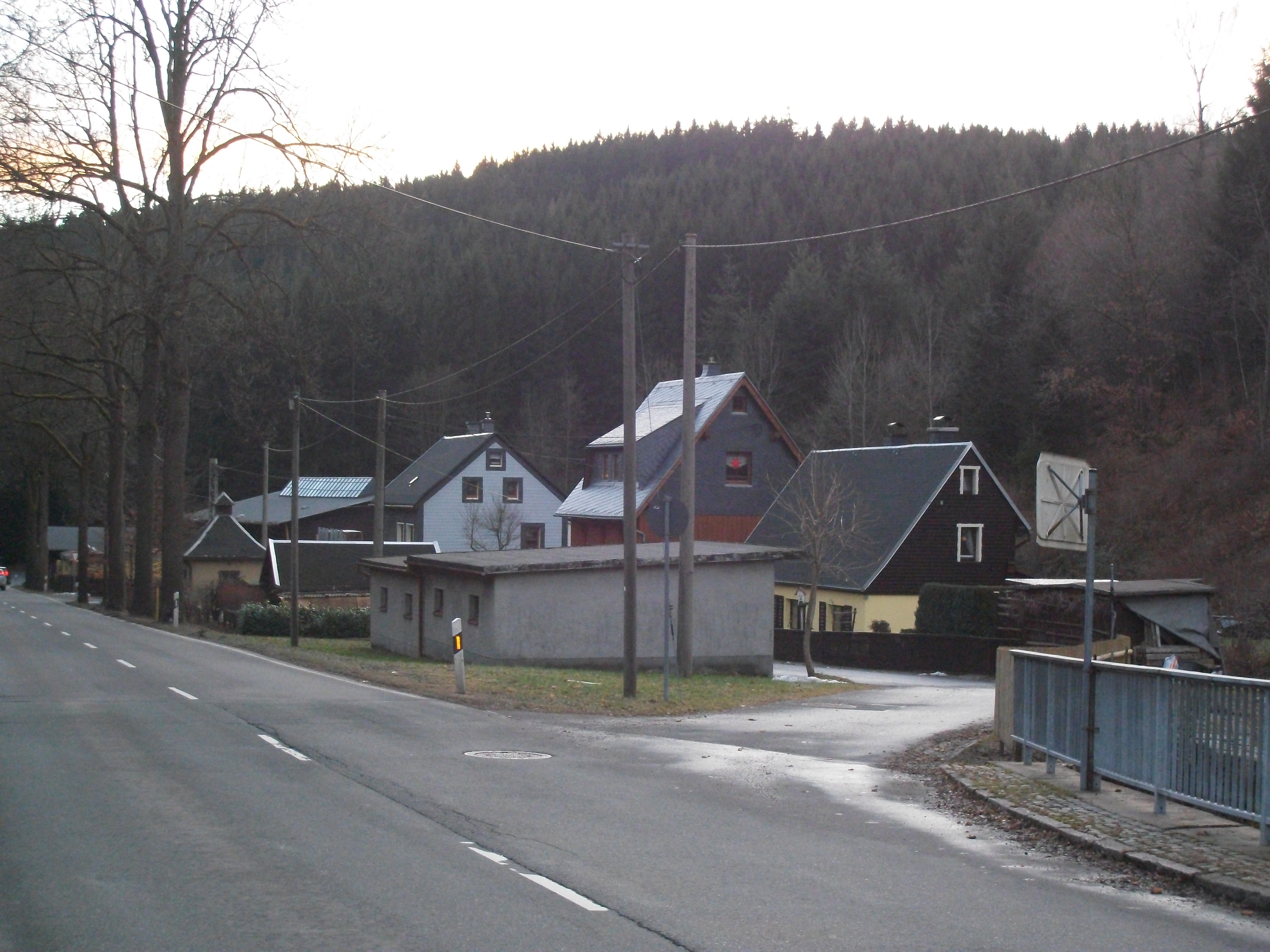 Siebenhöfen, Ortsansicht